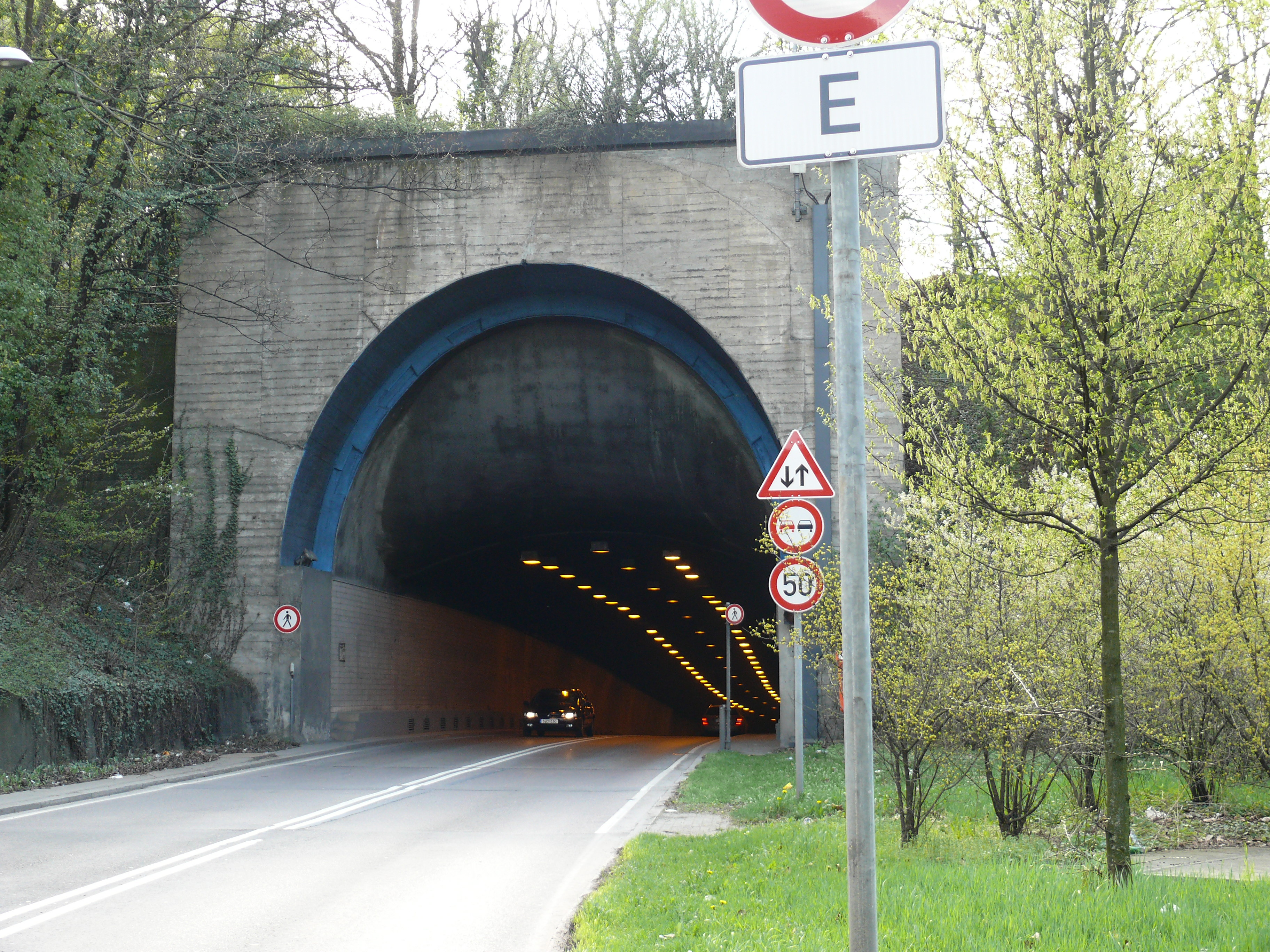 Ostportal des Wagenburgtunnels in Stuttgart.